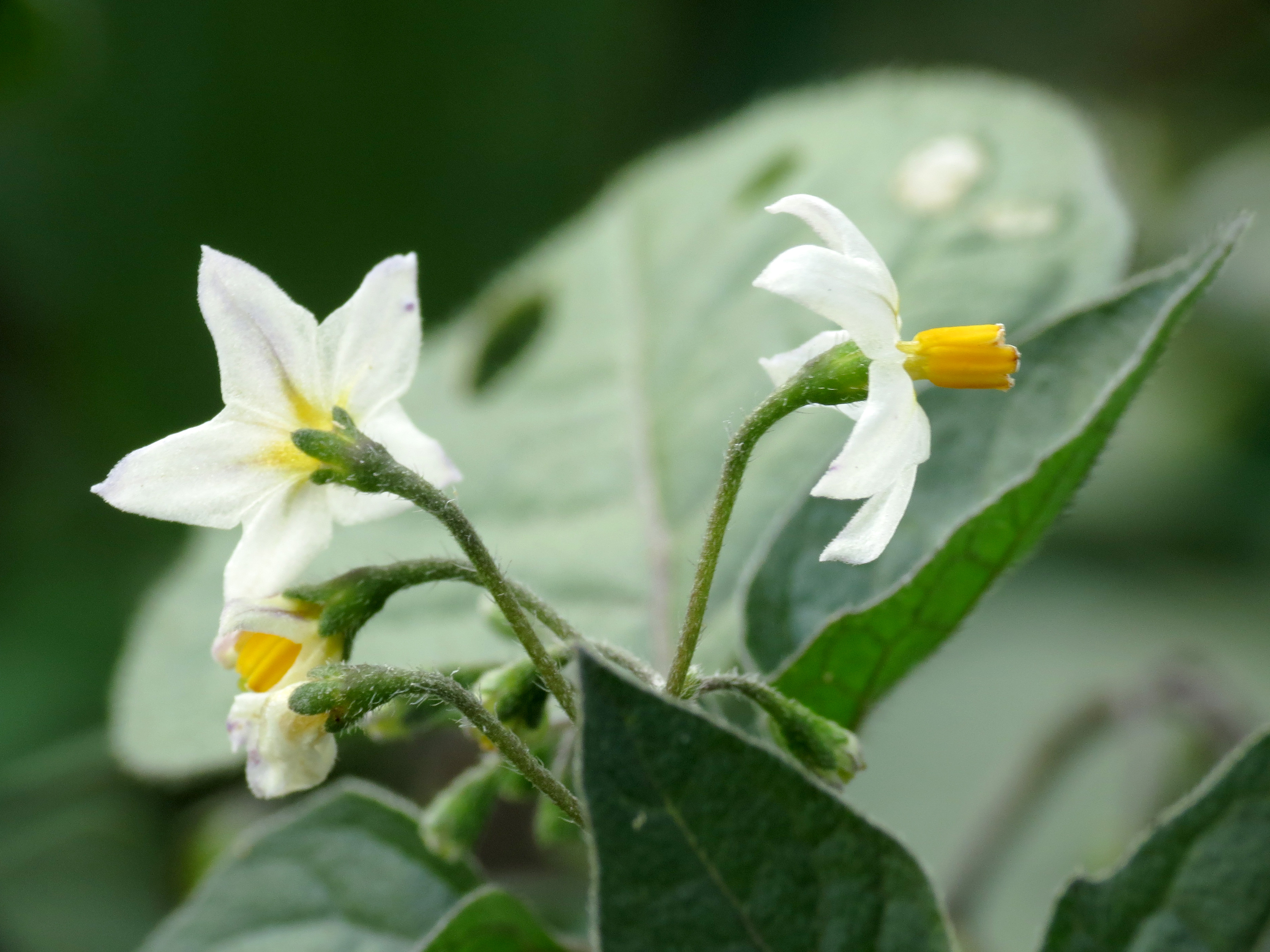 Solanum nigrum. Els Poblets, Alicante, Spain.